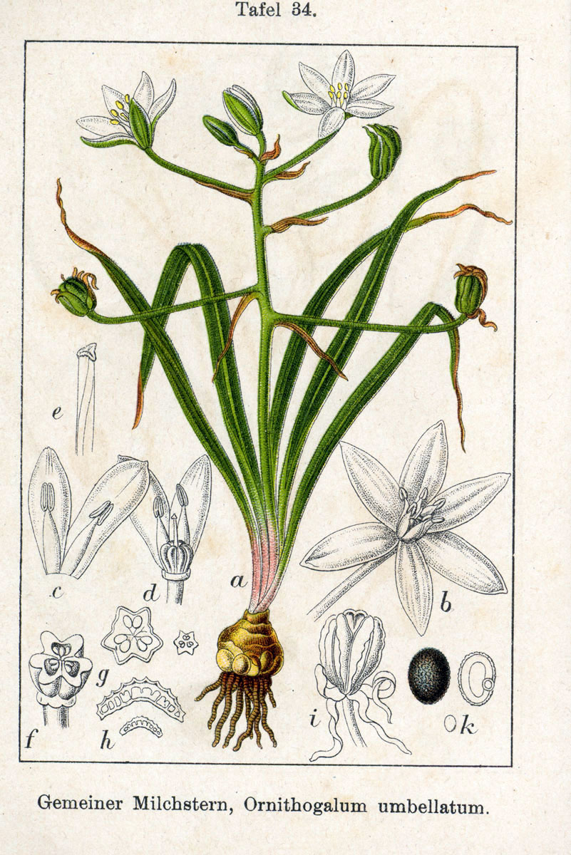 Ornithogalum umbellatum L. s. str. Original Description Gemeiner Milchstern, Ornithogalum umbellatum